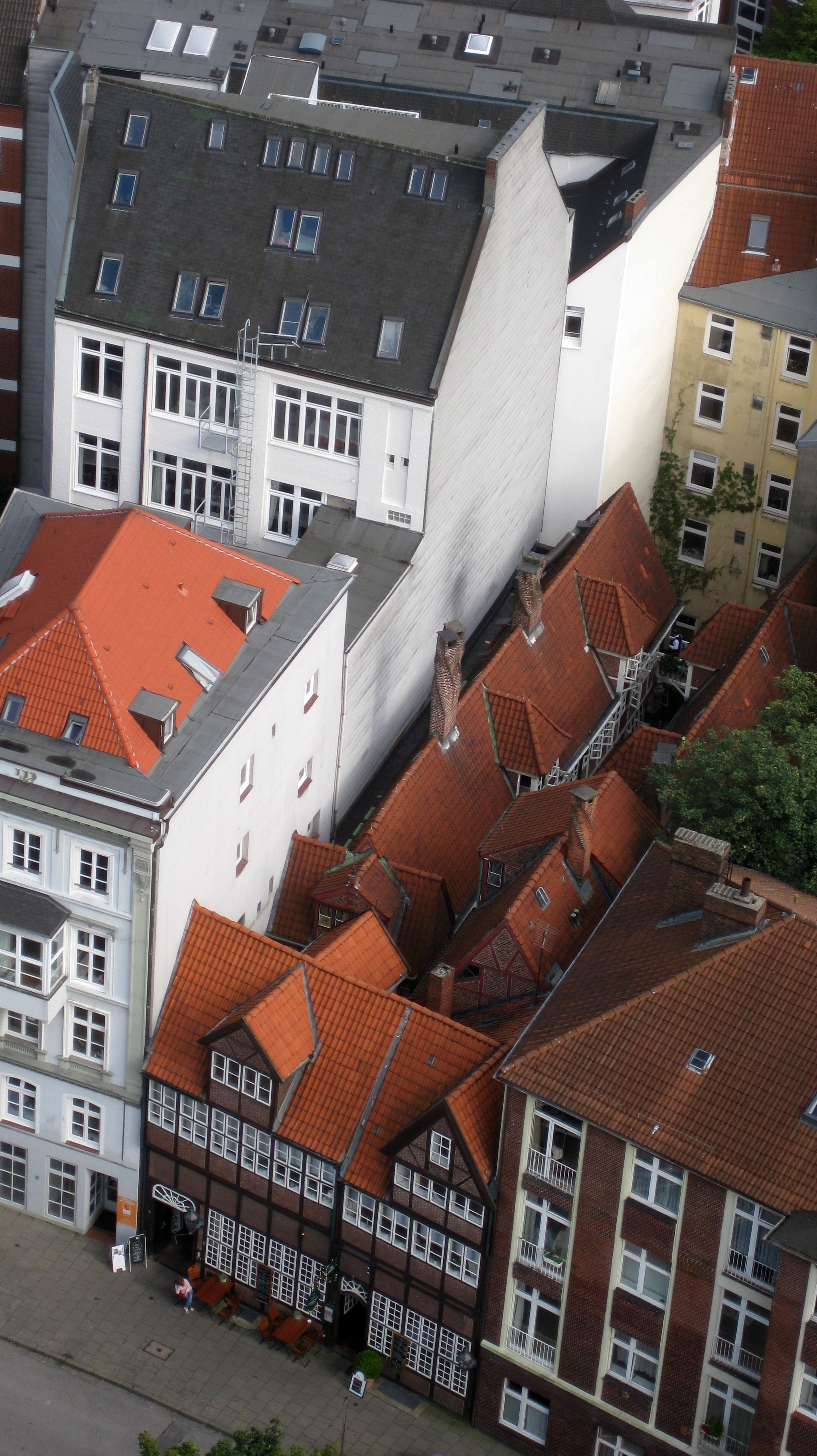 Krameramtswohnungen in Hamburg vom Turm des Michels aus photographiert. This is a photograph of an architectural monument.